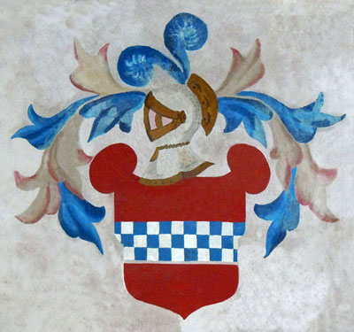 Stemma della famiglia Redini di Castel Goffredo.